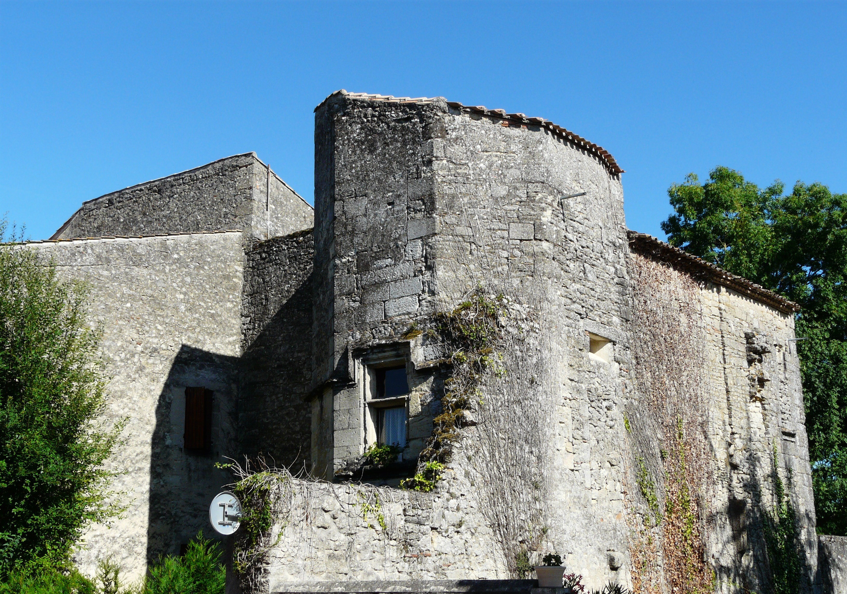 La tour du gouverneur, Monségur, Gironde, France